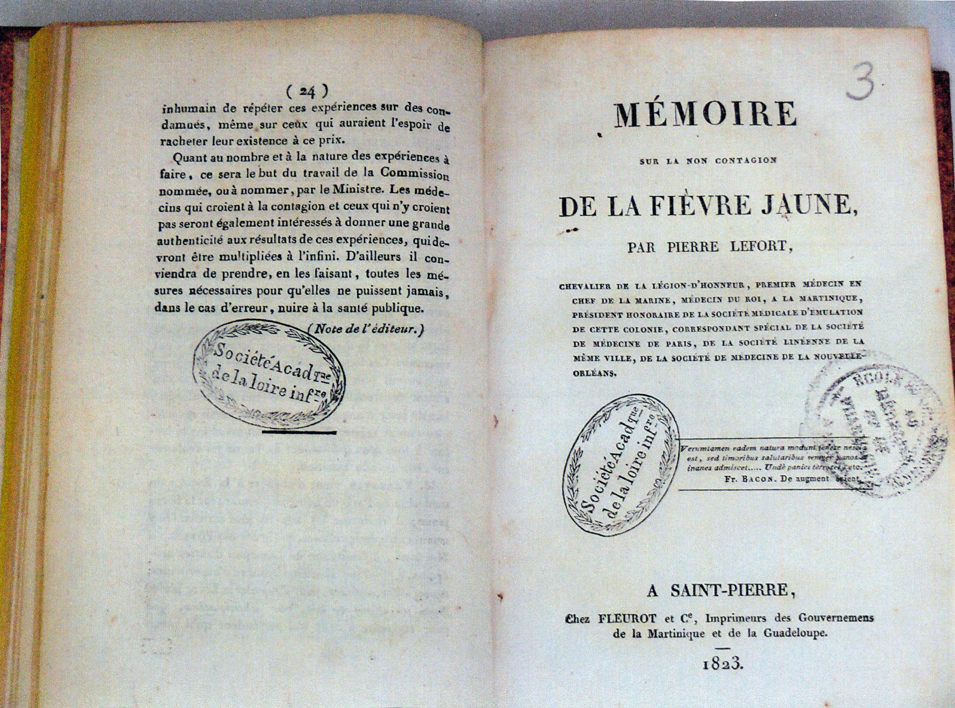 Page d'Introduction du Mémoire sur la fièvre jaune rédigé par Pierre Lefort